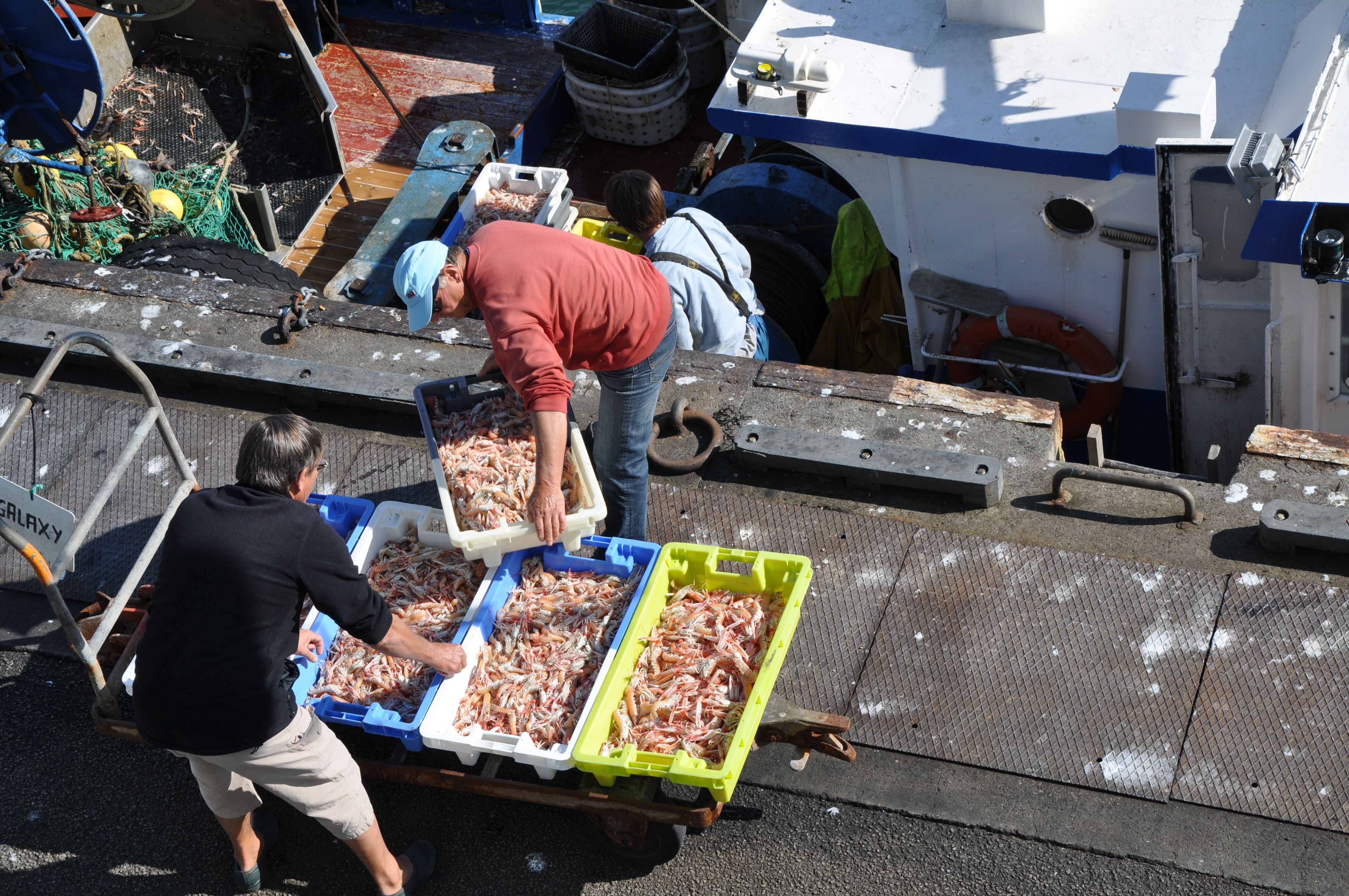 Déchargement de la pêche aux langoustines au Guilvinec (Finistère, 29)